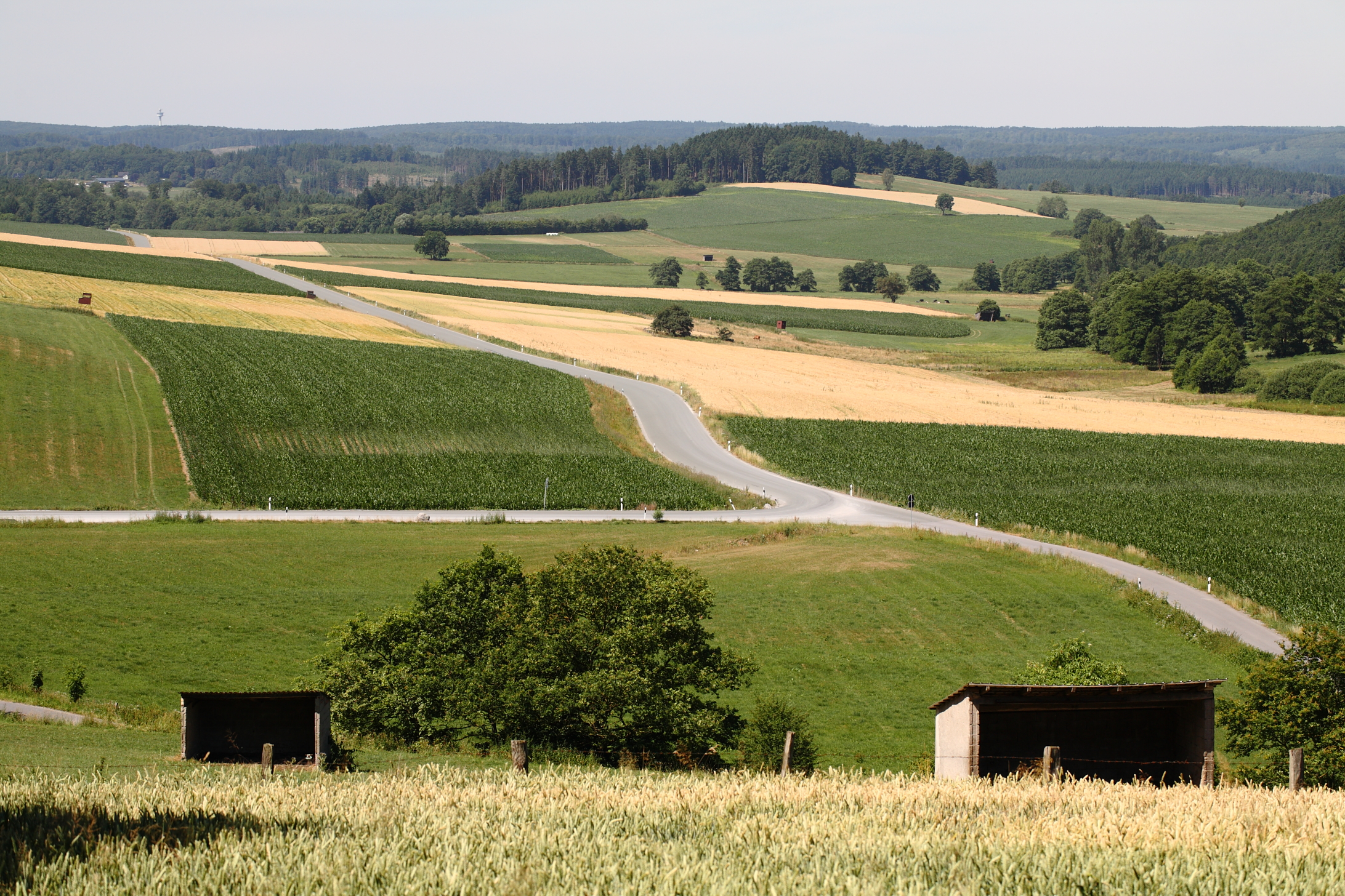 Zwischen Bleiwäsche und der L637 (links im Hintergrund der Fernmeldeturm Brilon-Allenberg). Offenlandbereiche hinter Wegabzweig gehören zum Landschaftsschutzgebiet Freiflächen im Lühlingsbachtal​.